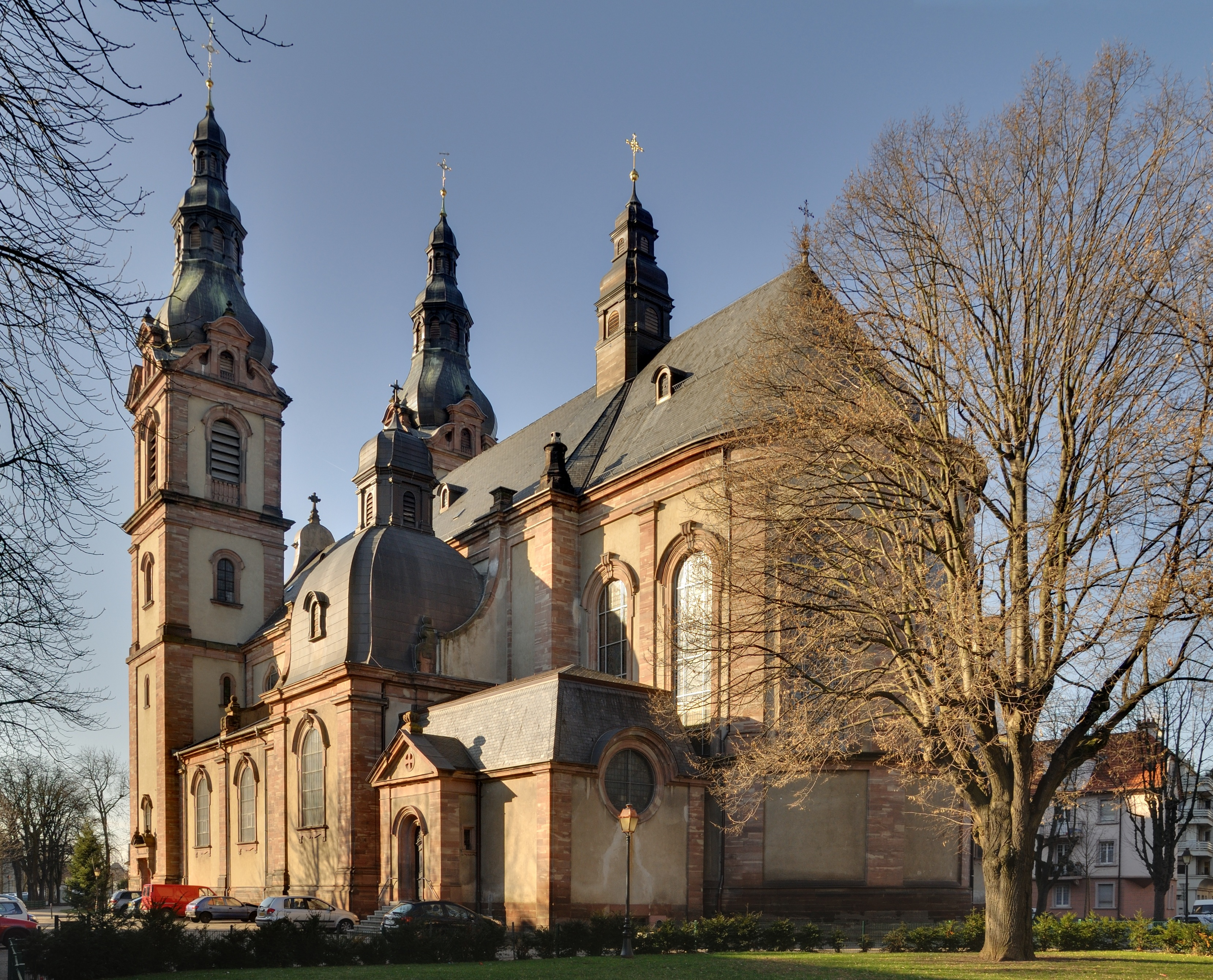 Außenansicht der Kirche Saint-Fridolin in Mulhouse